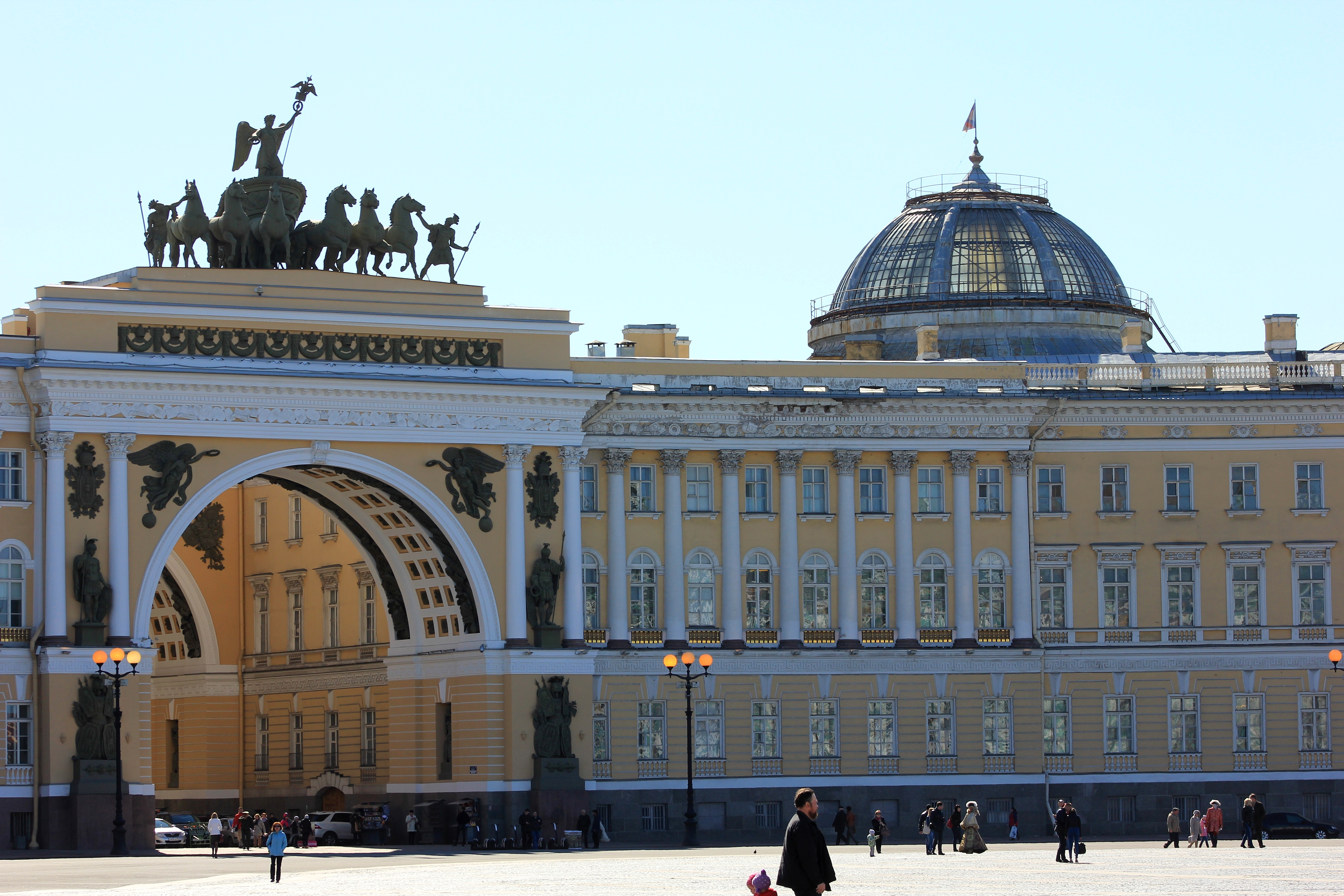 Взгляд с Дворцовой плащади на Арку Главного Штаба. Санкт-Петербург.